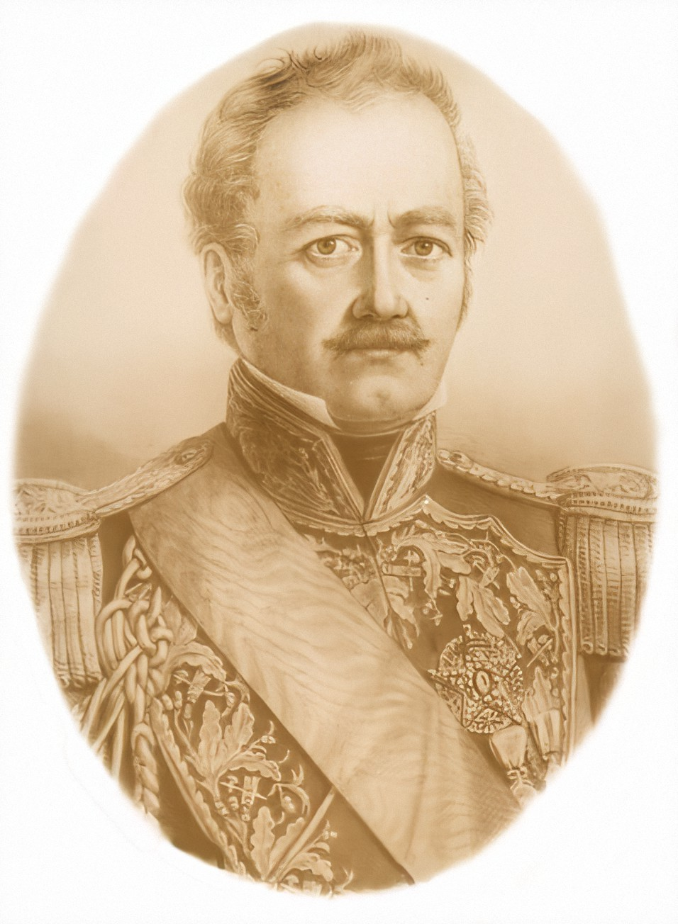 Ramón Freire Serrano (*Santiago, 27 de noviembre de 1787 - † 9 de diciembre de 1851) fue un militar y dirigente chileno que combatió durante la guerra de independencia de su país, hasta alcanzar el grado de Capitán General. Se desempeñó en diversas oportunidades en la primera magistratura, con los cargos de Director Supremo y Presidente de Chile. En el ejercicio de su cargo tuvo que enfrentar a las diferentes facciones que intentaban prevalecer en la naciente república, siendo finalmente derrotado por el partido dirigido por Diego Portales. Después de vivir largos años en su exilio en la Polinesia, regresó a su nación para vivir sus últimos años.